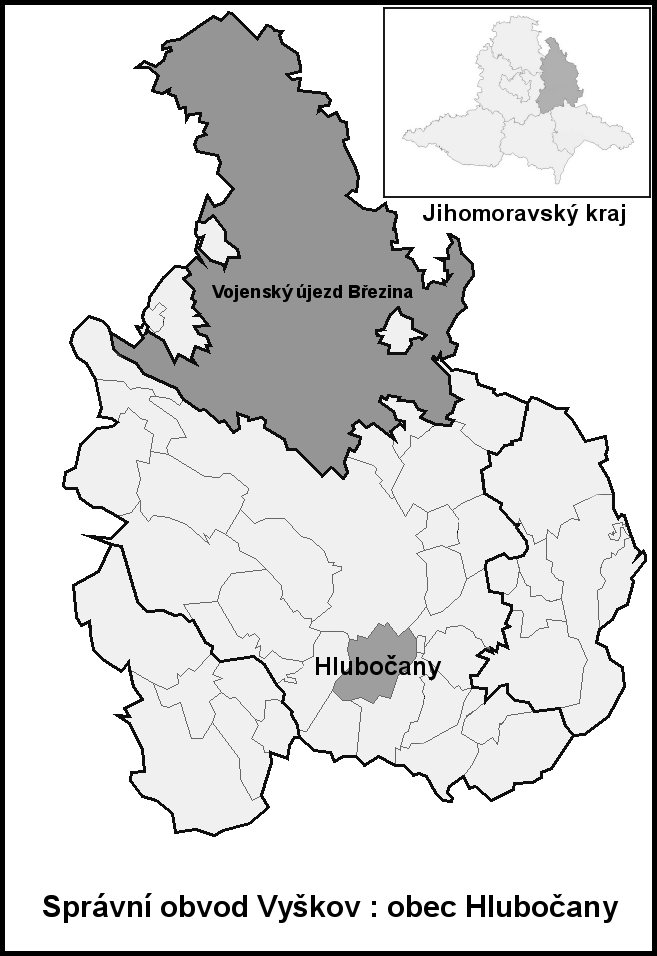 Hranice Hlubočany (Vyškov- czech republic)